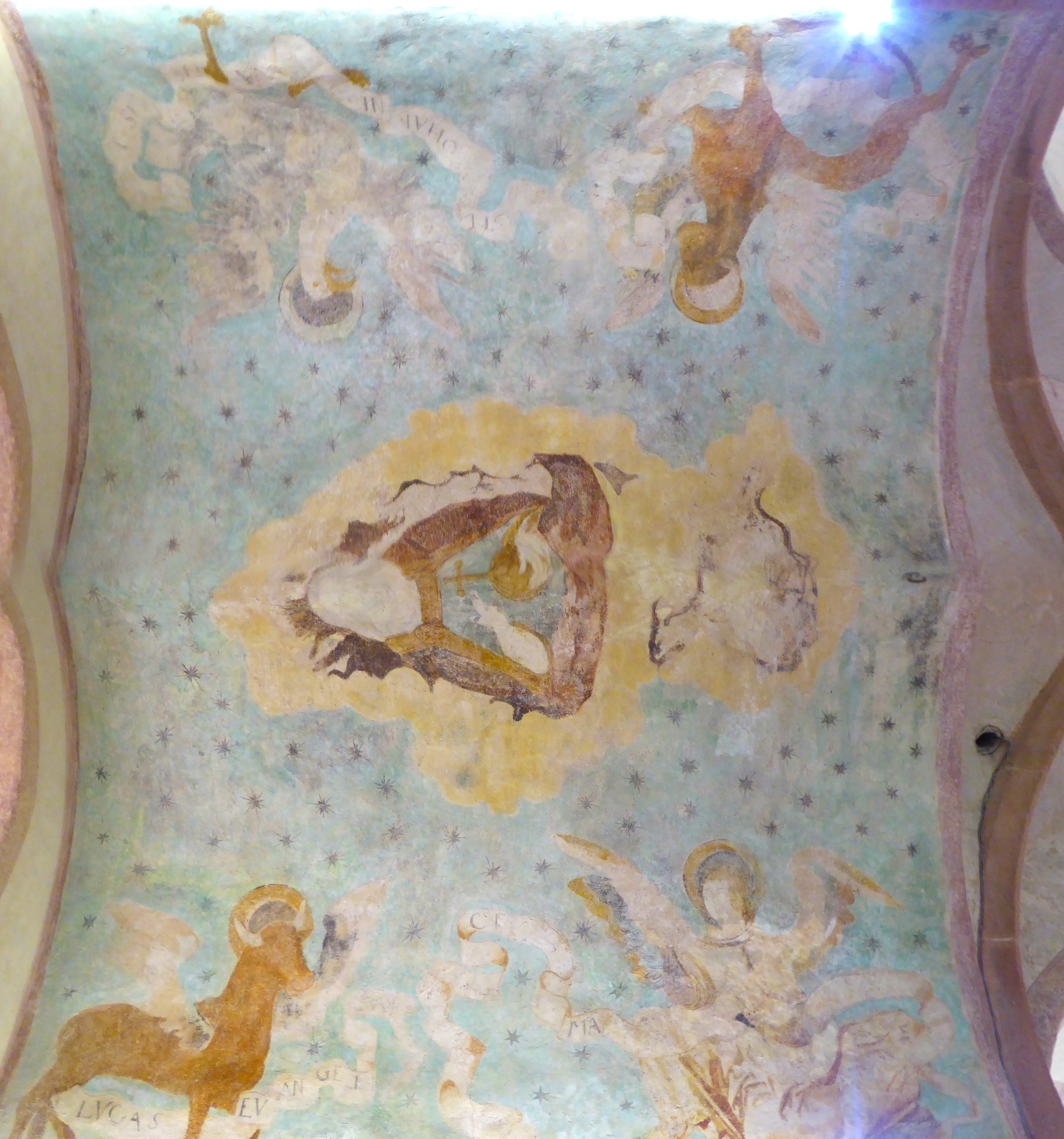 Fresken sind aus dem vierzehnten Jahrhundert